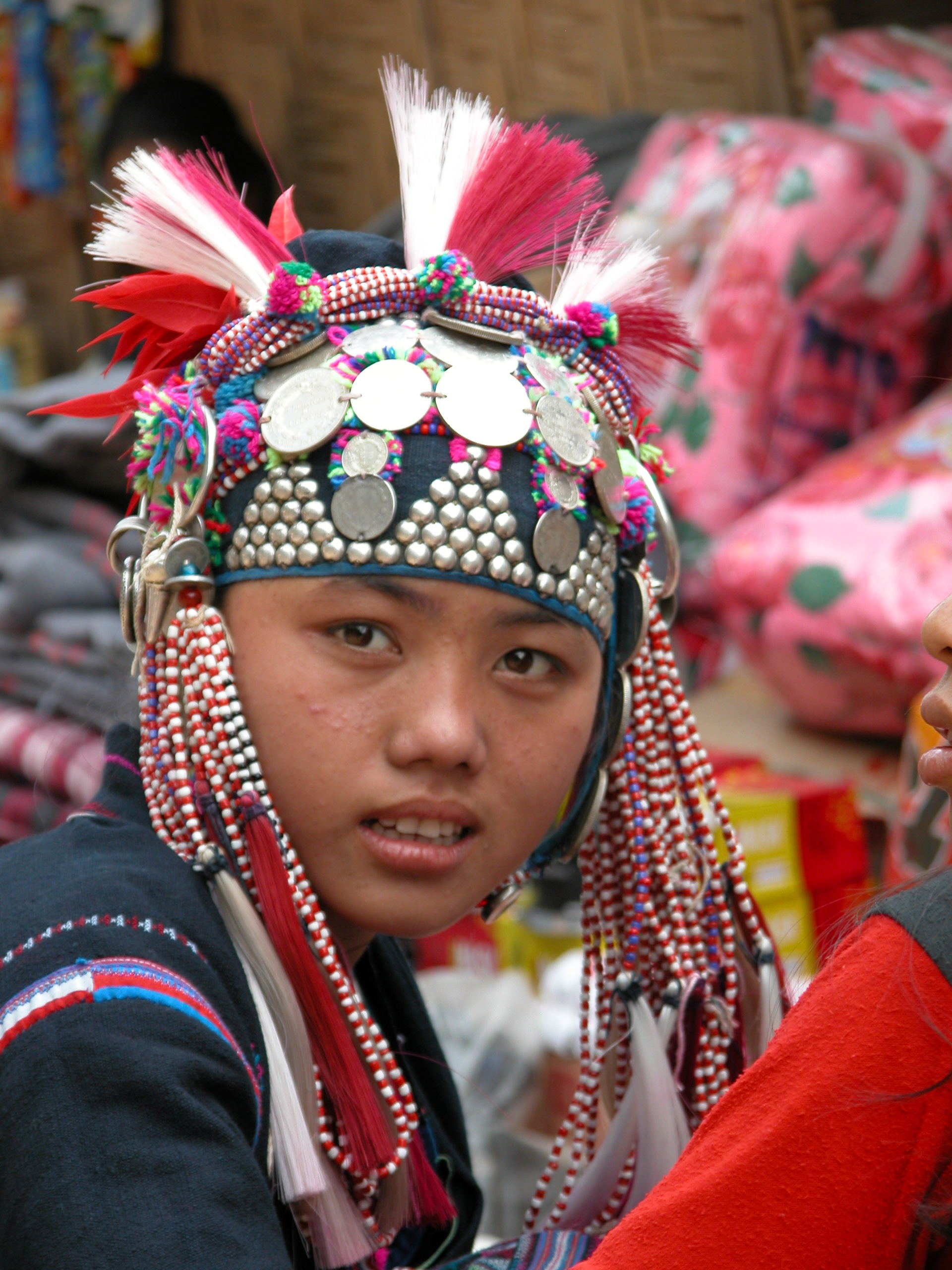 ethnie Akha nord laos nov 2003 oeuvre personnelle novembre 2003 Veton PICQ OEuvre personnelle, copyleft: licence multiple GFDL et creative Commons CC-BY-SA-2.5